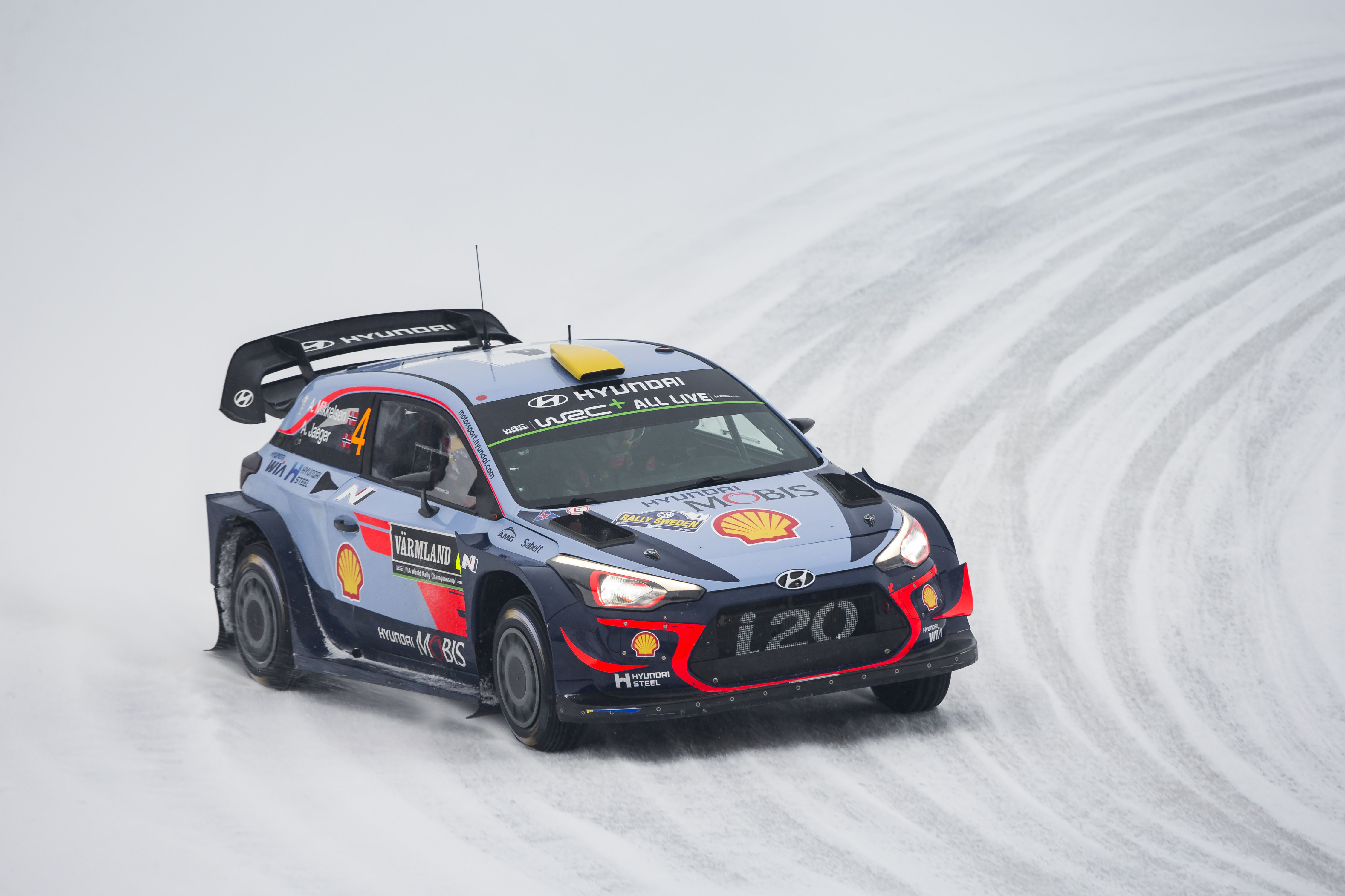 Andreas Mikkelsen i Anders Jæger podczas Rajdu Szwecji 2018